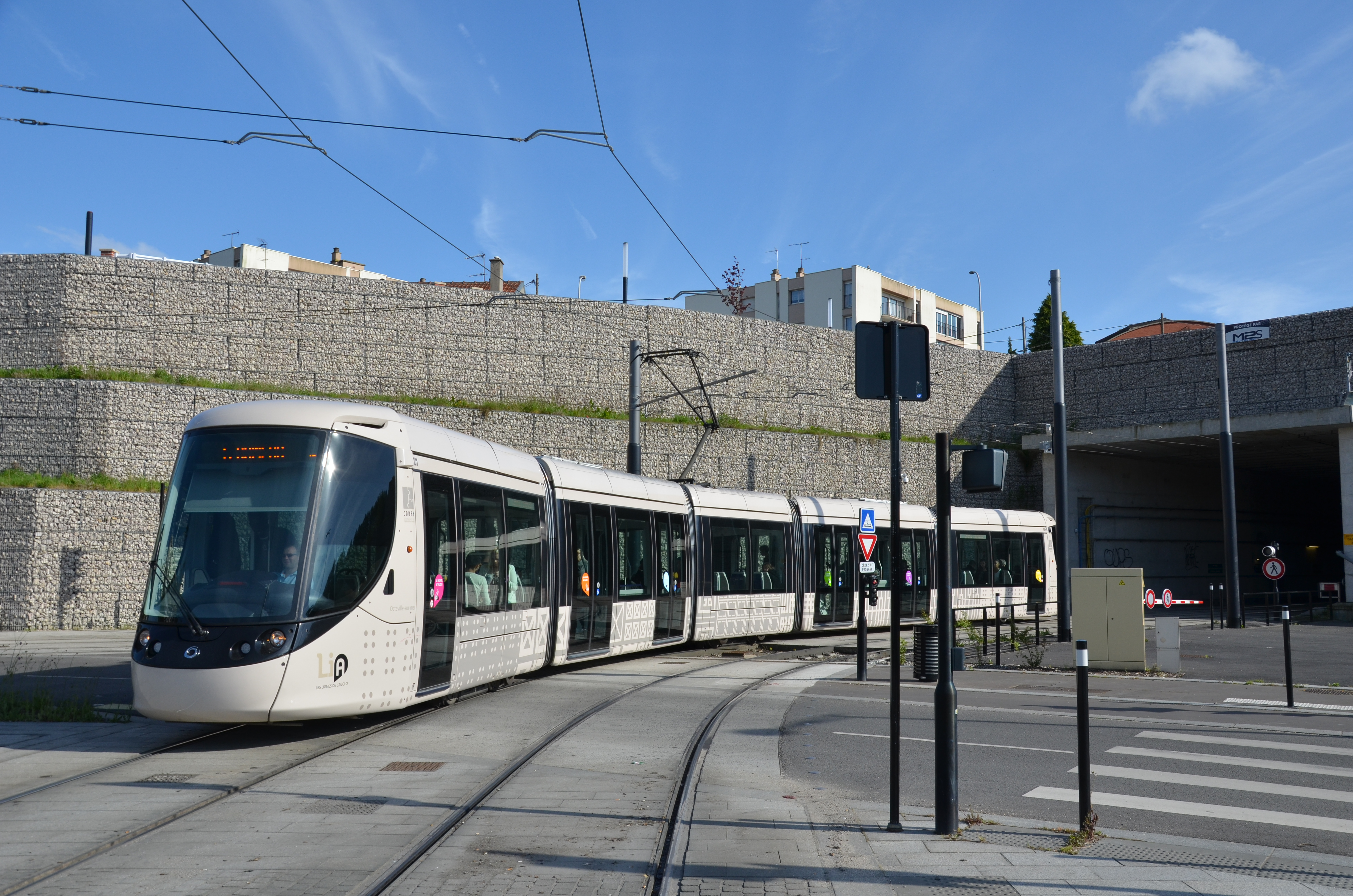 Alstom Citadis 302 n°008 de la ligne A du tramway du Havre quittant le tunnel Jenner.